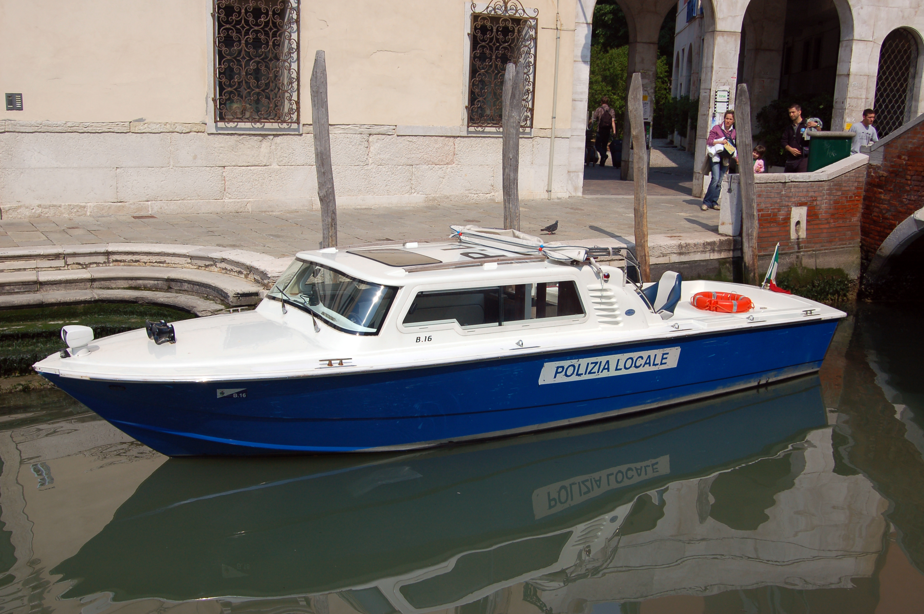 Polizia Locale